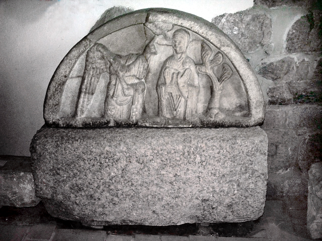 Tympanon Zwiastowania, Kościół Świętej Trójcy i Najświętszej Marii Panny w Strzelnie